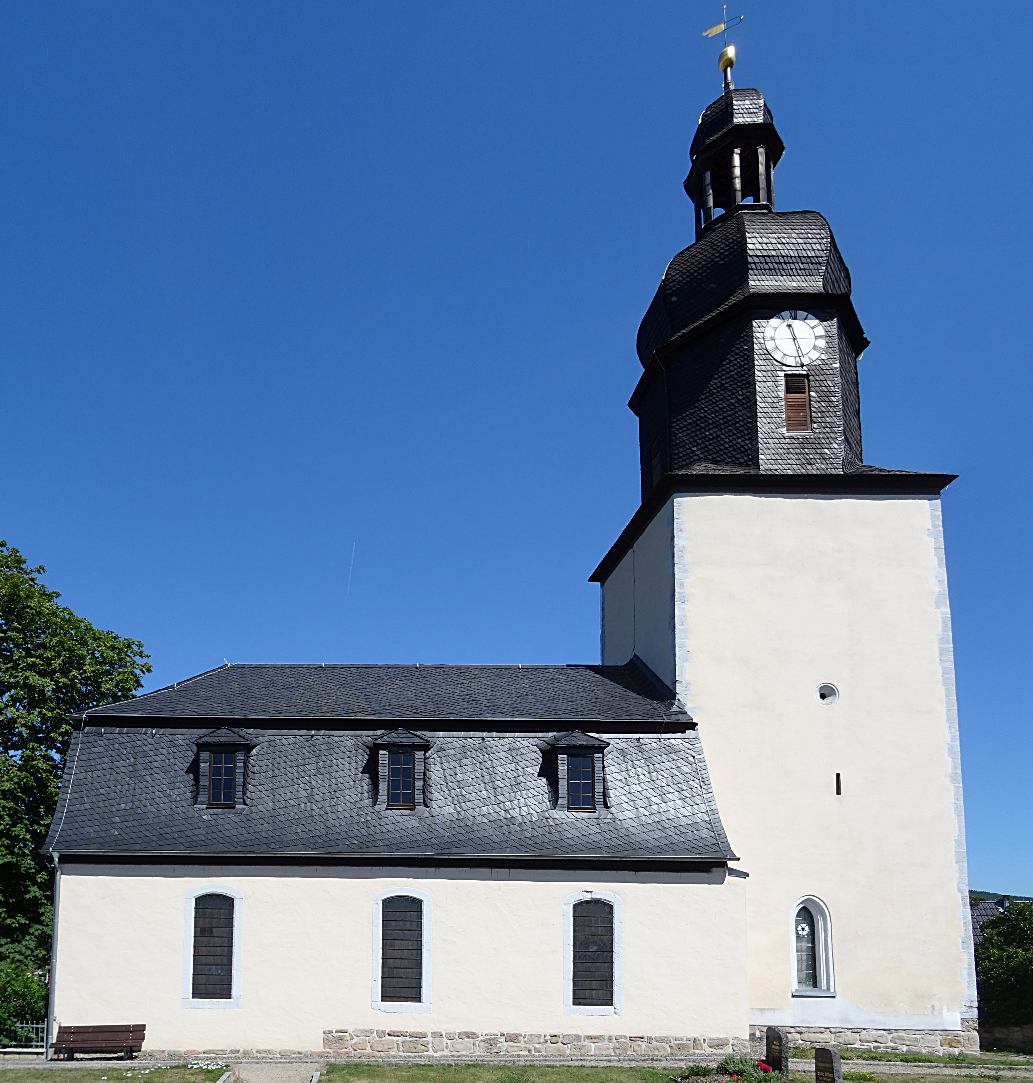 Dorfkirche Oberwellenborn von Süden